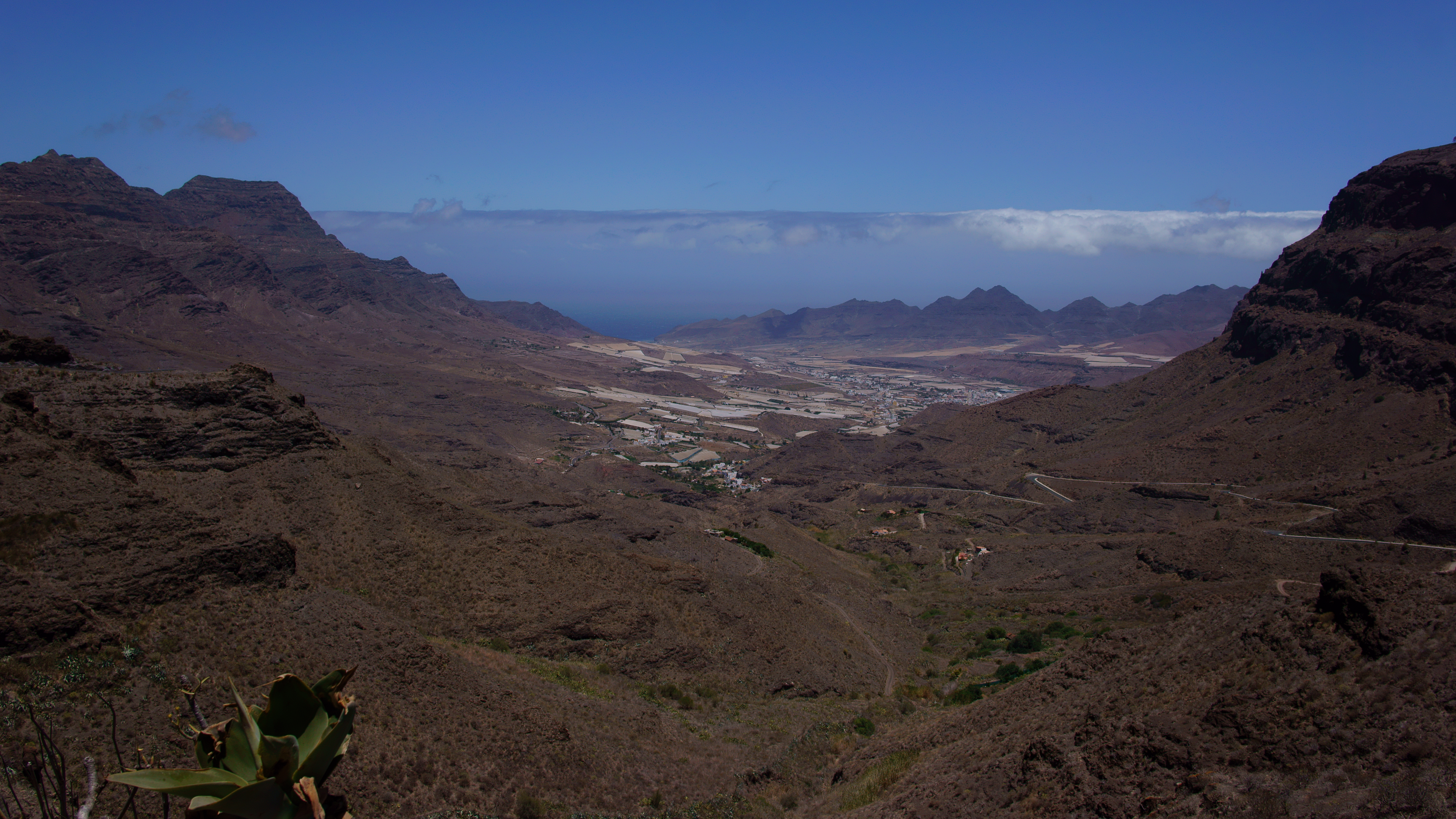 La Aldea de San Nicolas seen from GC200 / GC204 junction near Tasartico